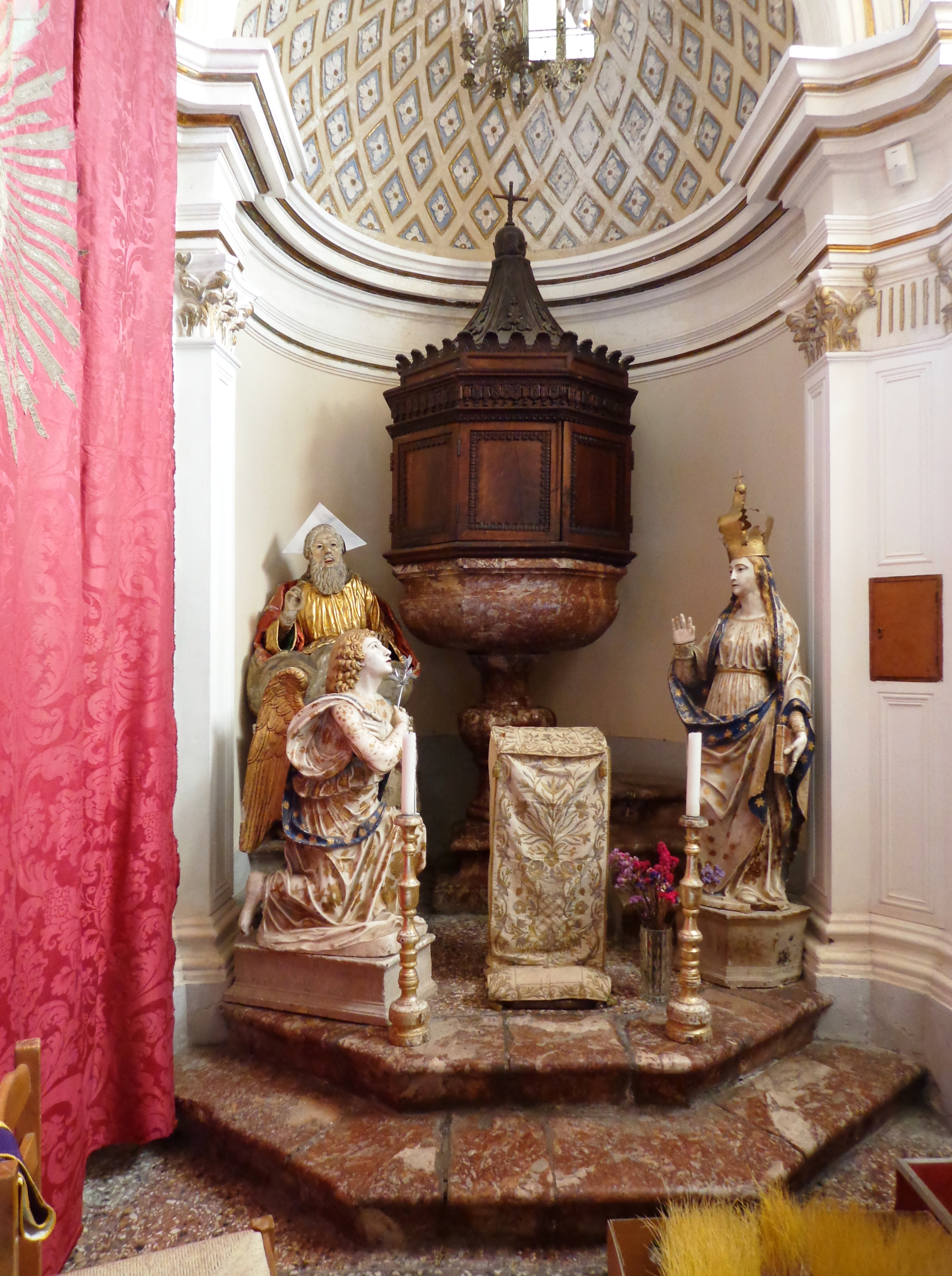 Duomo di Novara di Sicilia esterno